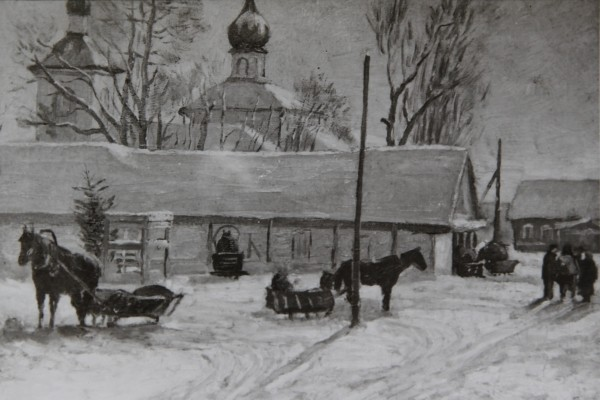 Беларуская (тарашкевіца): Малеч (Maleč), пляц Рынак (plac Rynak). Царква-мураўёўка